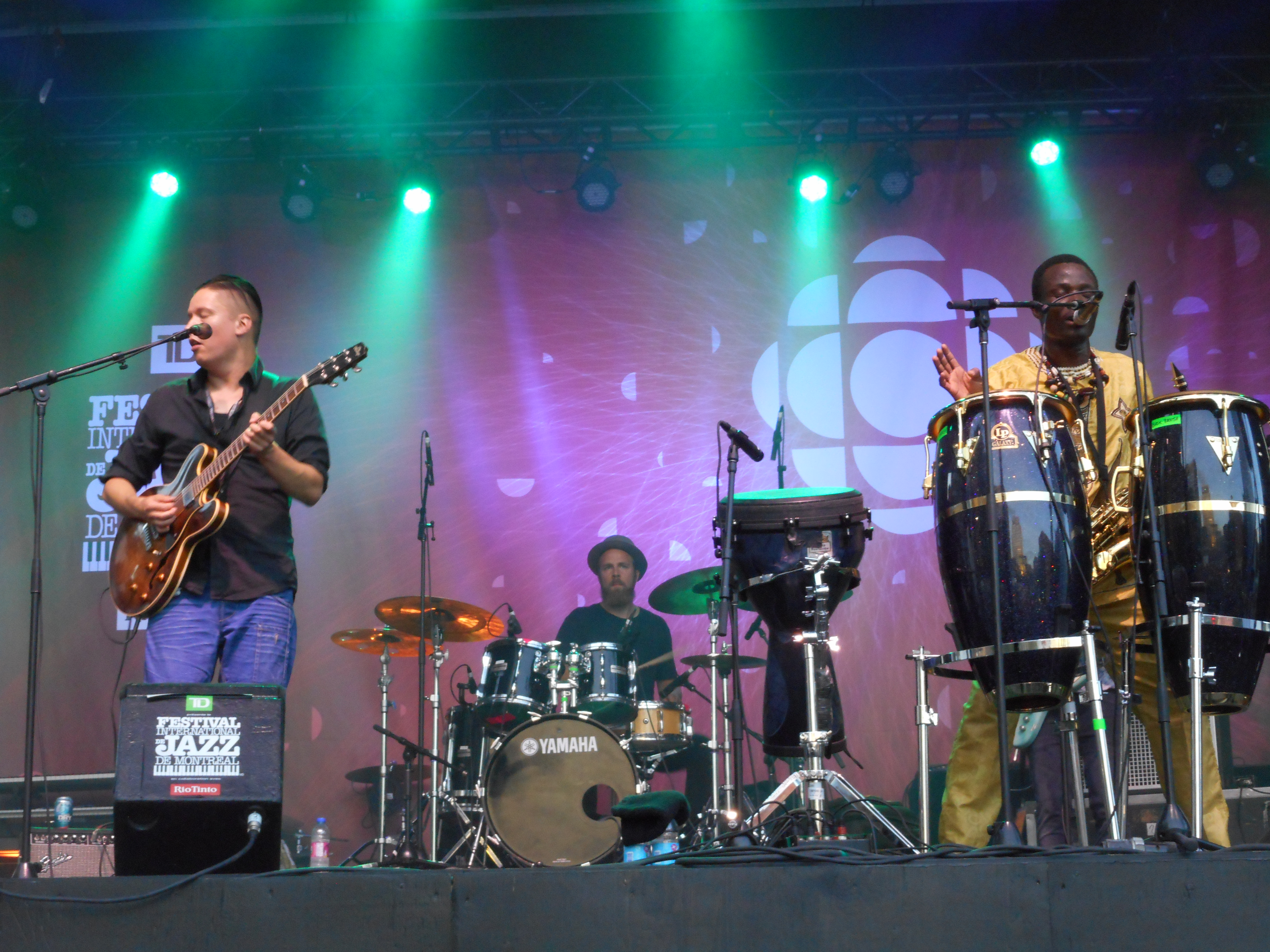 Spectacle du Helsinki-Cotonou Ensemble, le 7 juillet 2016, sur l'îlot Clark, dans le cadre du Festival international de jazz de Montréal